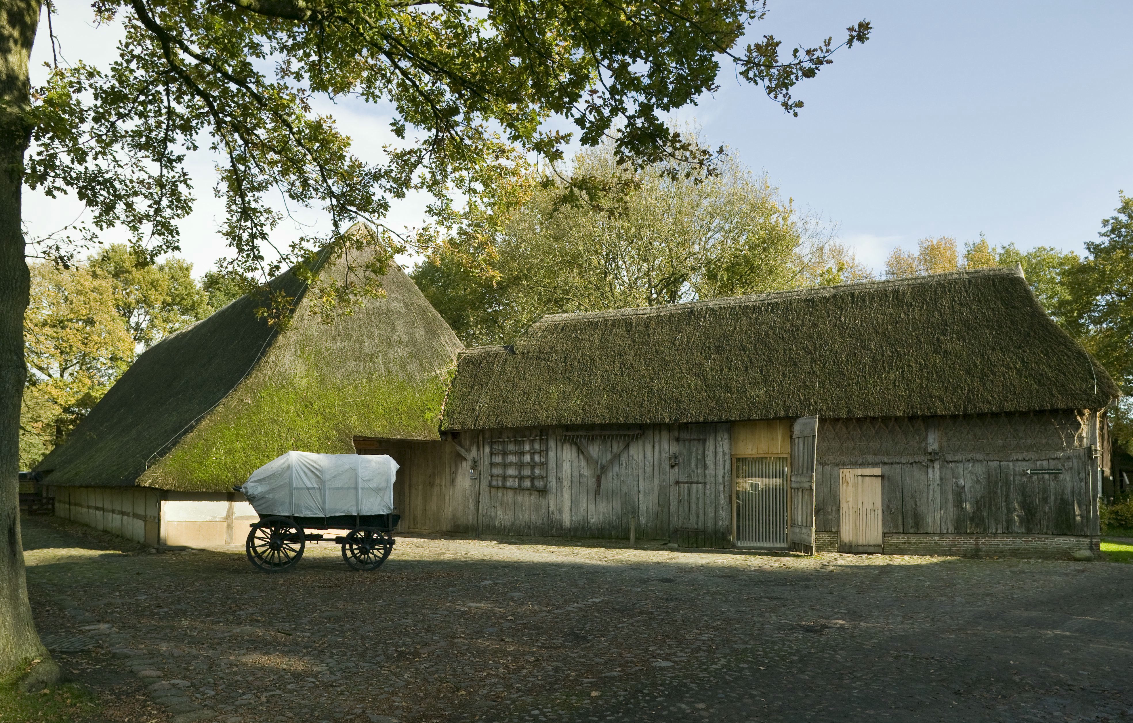 Boerderij - Huis Dolving - Voorheen Bruntingerhof: Boerderij met stal (opmerking: Gefotografeerd voor fotofolie nieuwbouw)